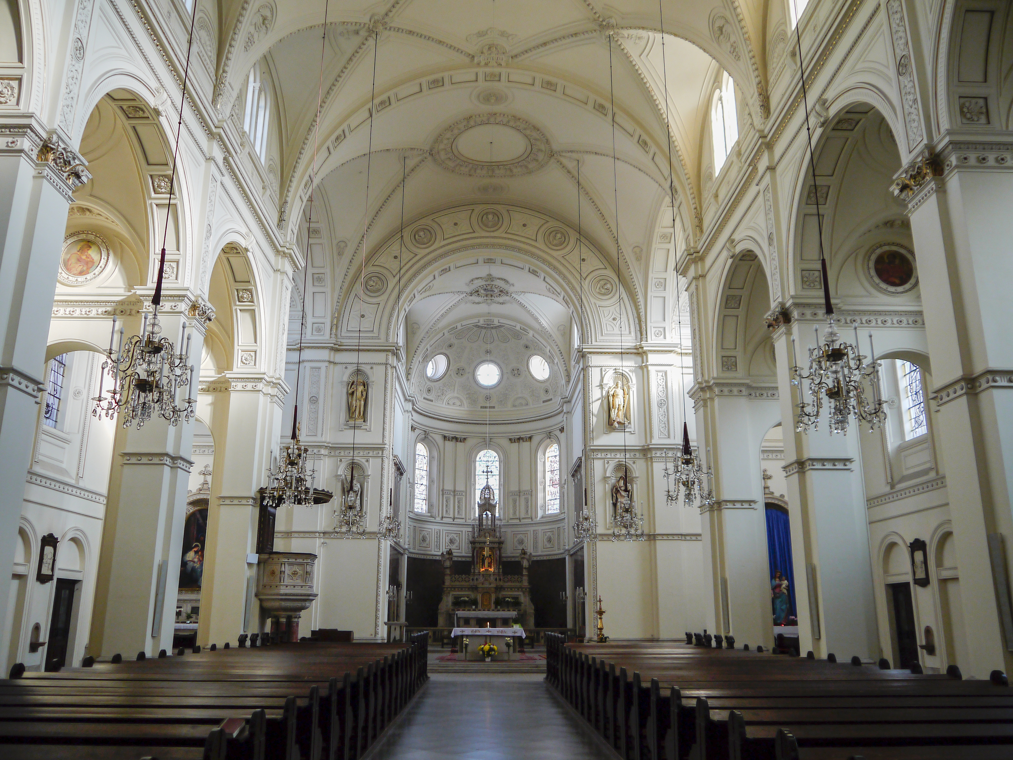 Breitenfelder Pfarrkirche innen